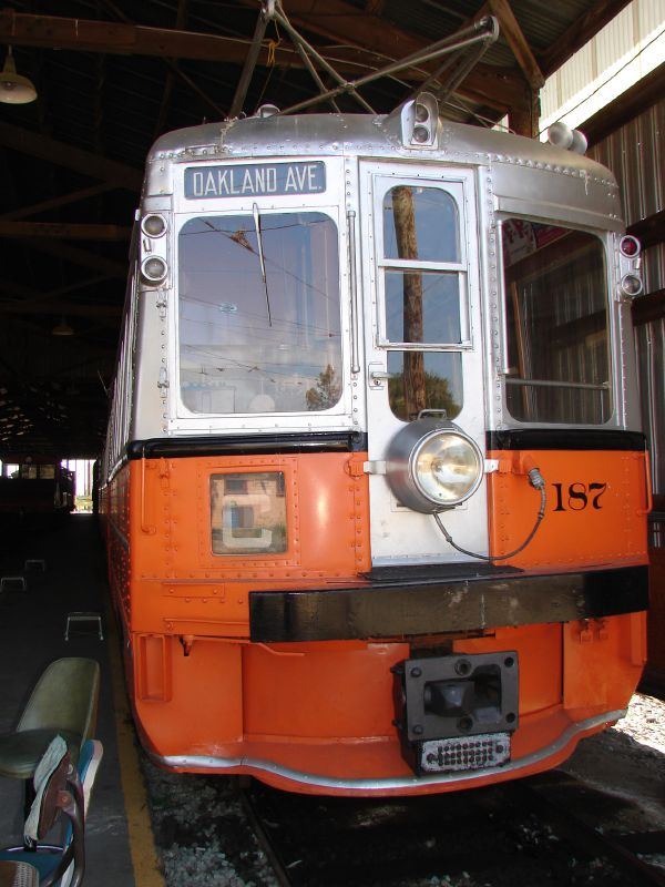 Key System #187